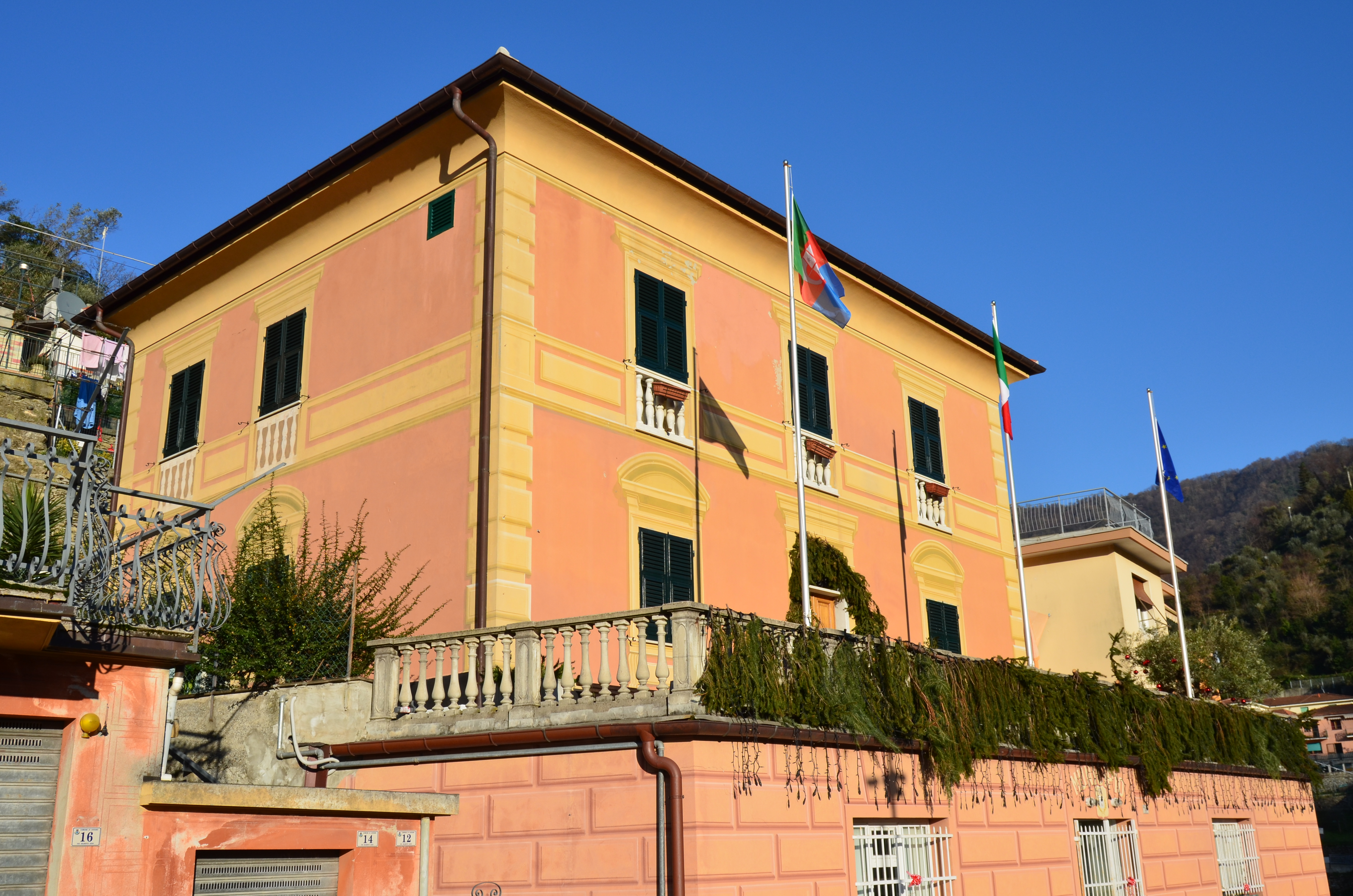 Municipio di Avegno, Liguria, Italia